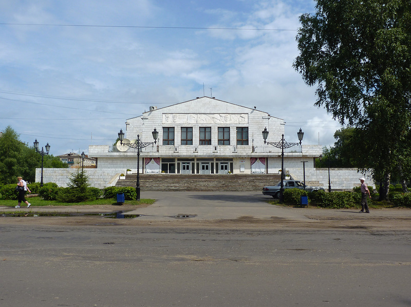 Переборы. Главный фасад Дворца культуры